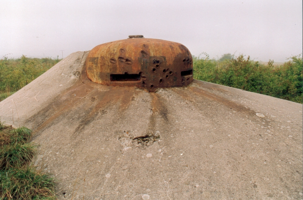 VDP-Glocke, Infanteriewerk Laudrefang, Block 5, Maginot-Linie